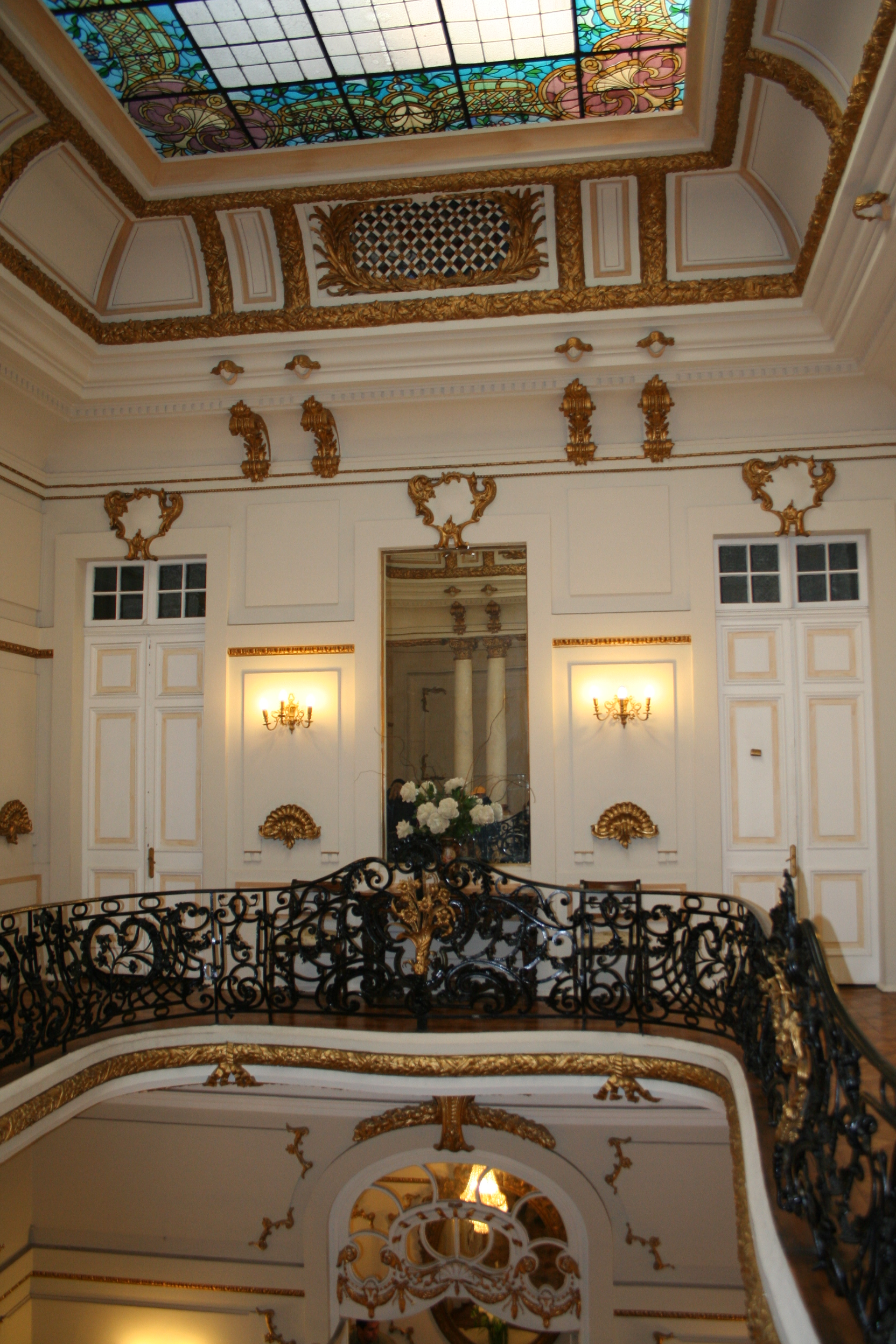 Pasillo segundo piso Palacio Subercaseaux. This is a photo of a national monument in Chile: 815